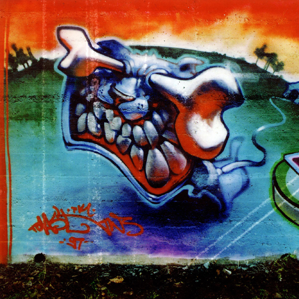 Bonedog